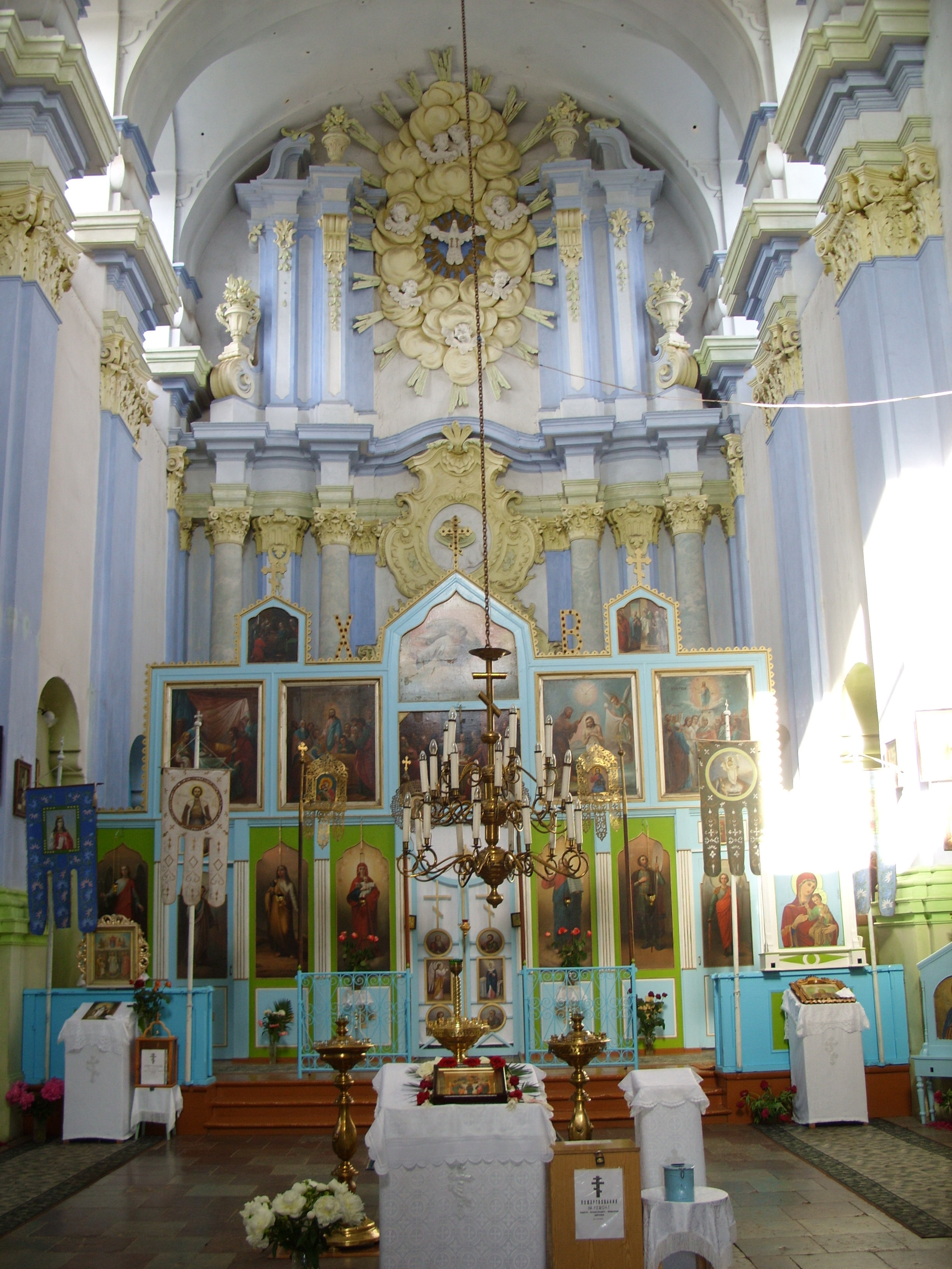 Беларуская (тарашкевіца): Царква Аляксандра Неўскага (былы касьцёл Сьв. Яна Хрысьціцеля)убраньне галоўнага альтара. в. Сталавічы This is a photo of Belarusian heritage monument. Reference number: 112Г000066 ( WLM)